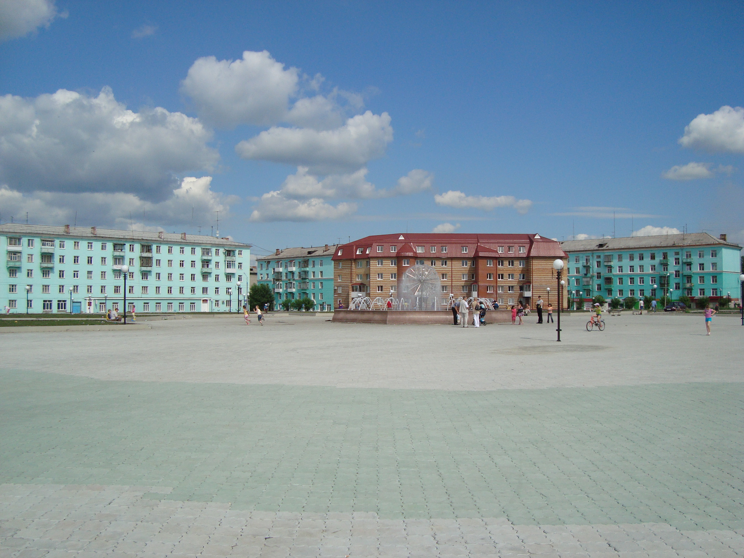 Центральная площадь города Серова